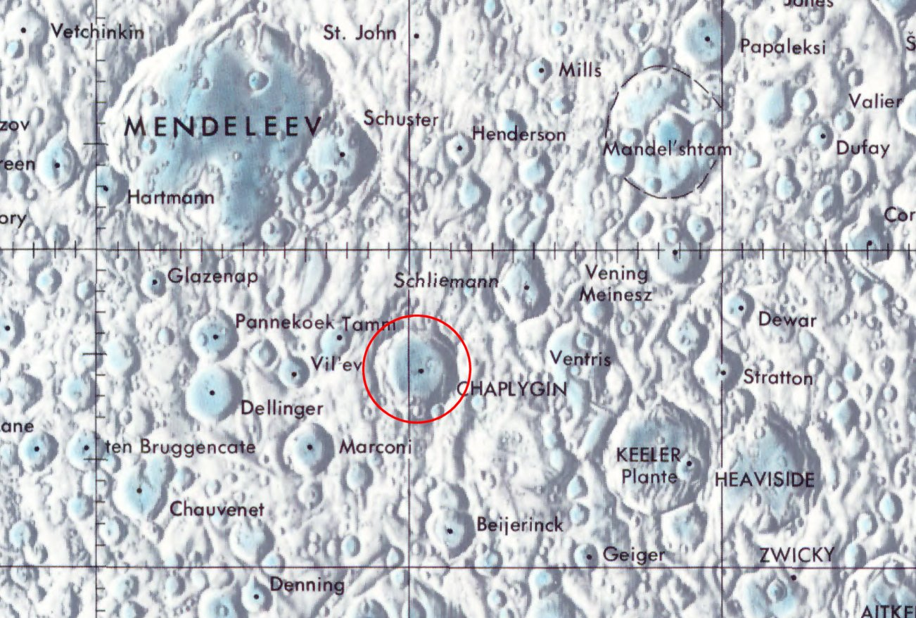 Cráter Chaplygin. Localización (Mapa Misión Clementine)